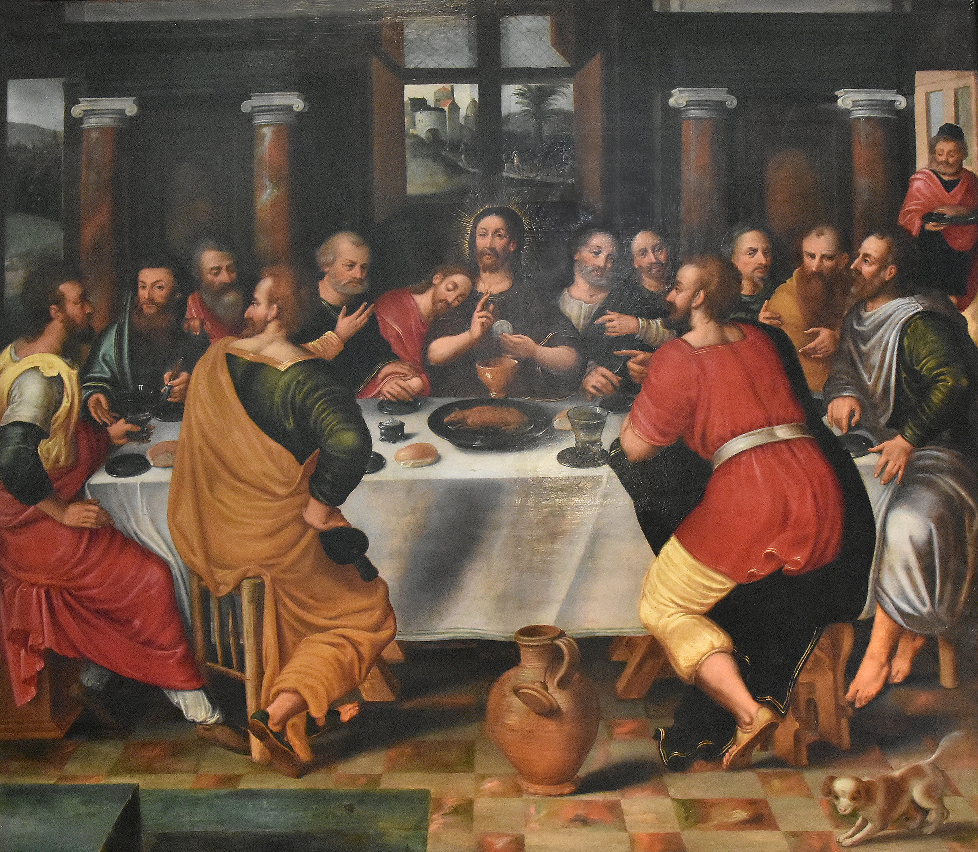 Frans Francken (I) (ca.1542-1616) Het Laatste Avondmaal Heilige Kerstkerk Gent 22-06-2019 This photo of movable heritage has been taken in the Flemish Region